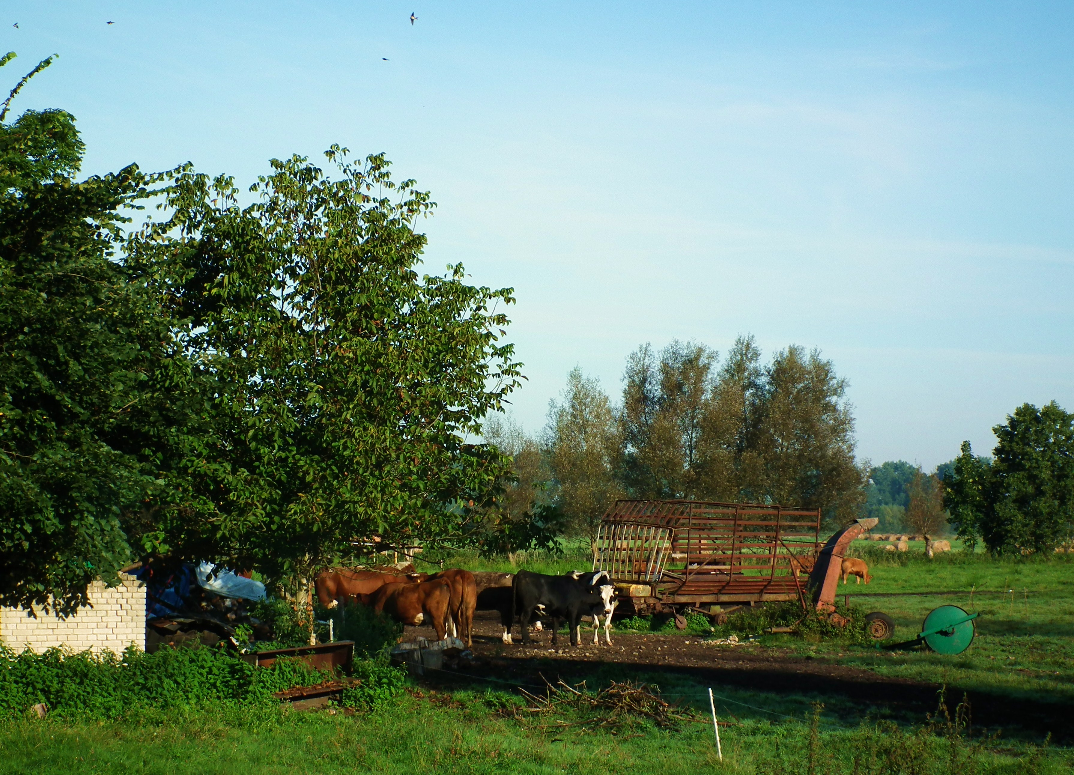 Pejzaż ze wsi Bolemin - błota nadwarciańskie.